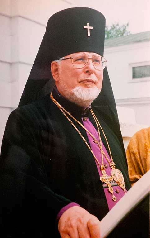 Архиепископ Амвросий Щуров